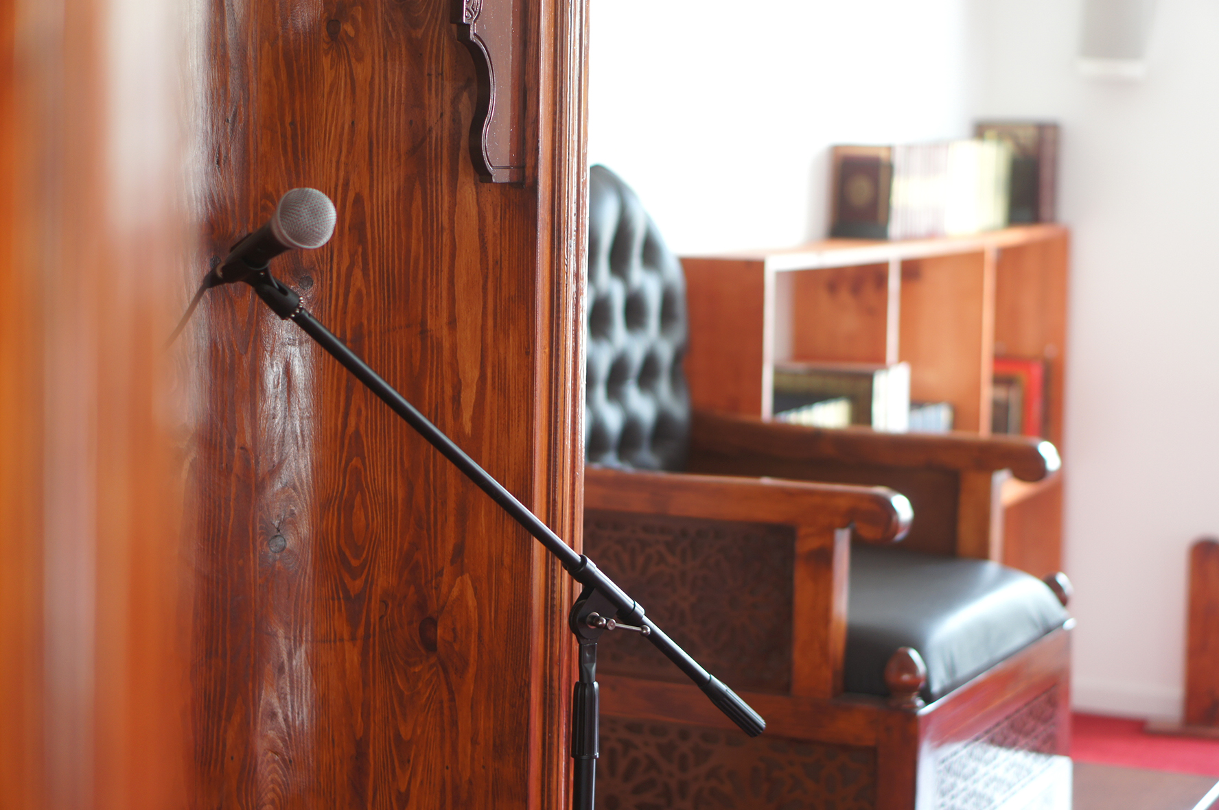 Espace prière de la Mosquée Mantes Sud